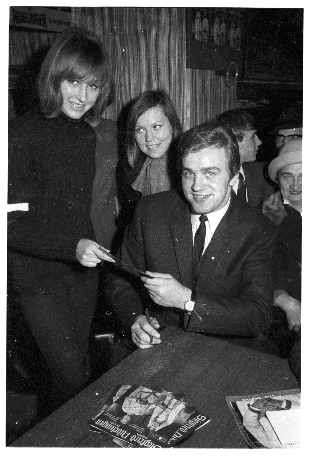 Der in Kiel geborene Spitzensportler und Schauspieler gibt Autogramme im Kaufhaus Defaka anlässlich der Erstaufführung seines Films "Die Nibelungen" in Kiel.